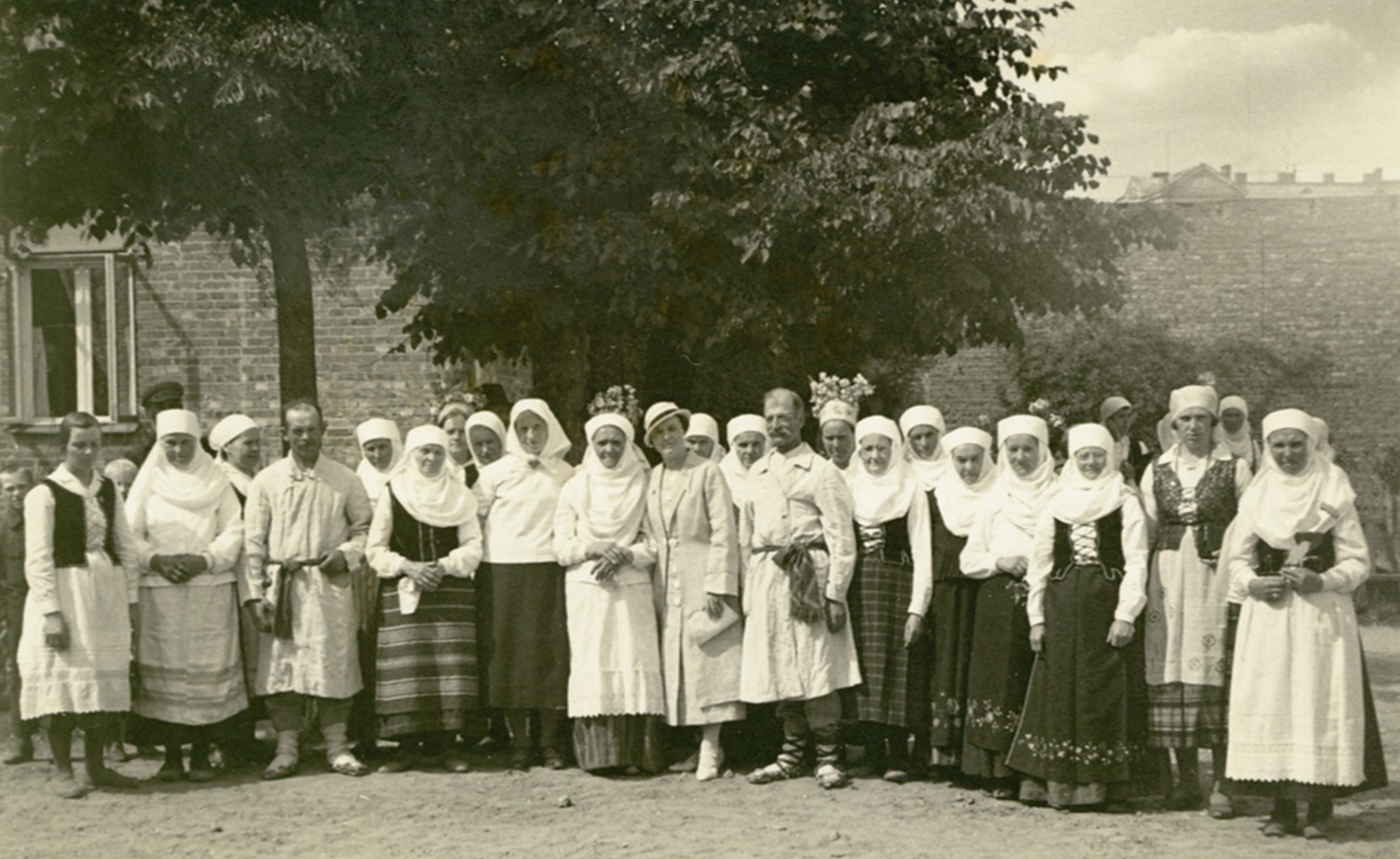 Spektaklio "Kupiškėnų senoviškos vestuvės" dalyviai. Apie 1930 m. Fotografijos autorius nežinomas. Fotografija publikuota leidinyje "Tai bent vestuvės".